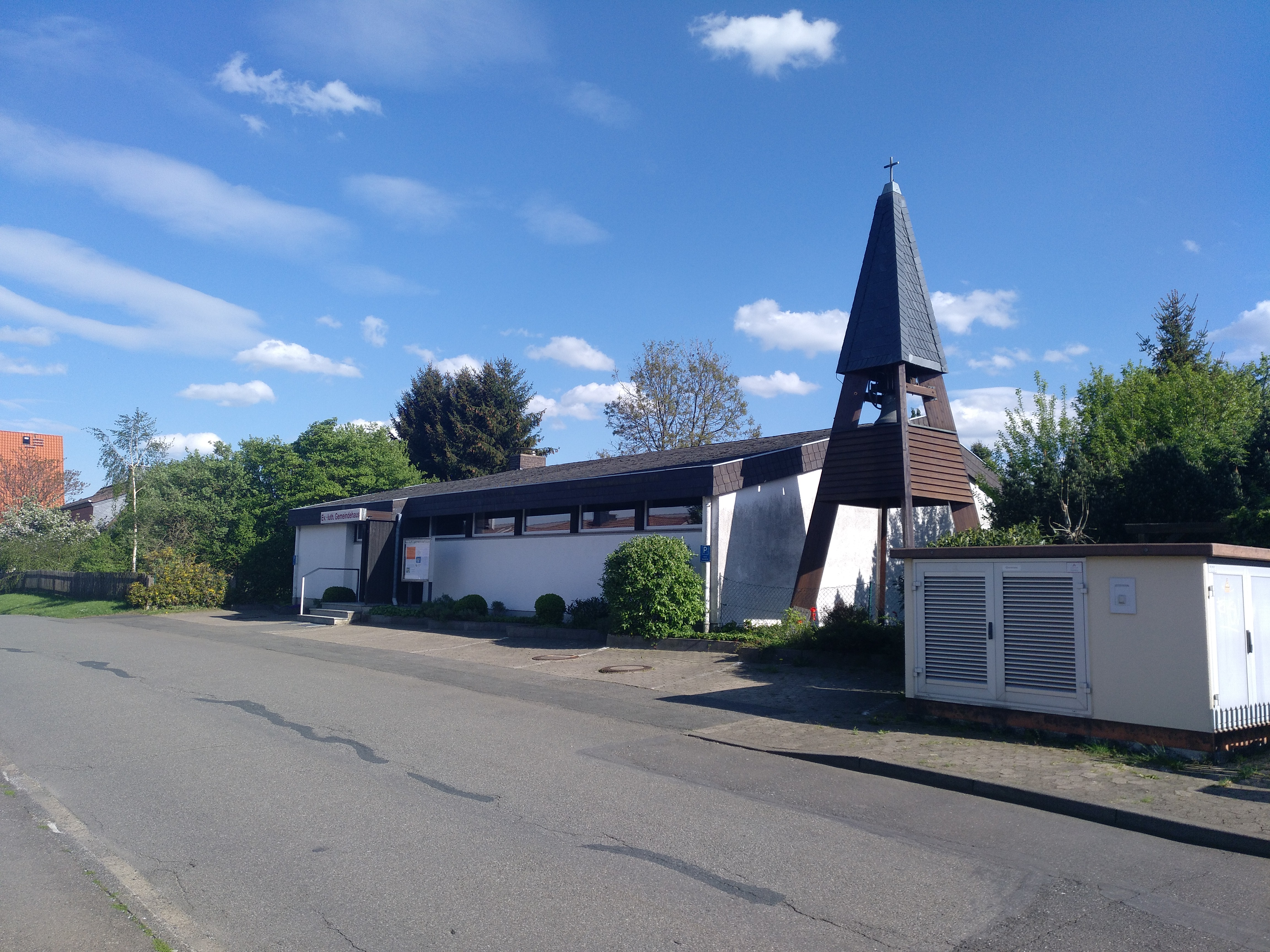 Evangelisch-lutherisches Gemeindehaus in Göttingerode, gehörend zur Gemeinde Schlewecke-Göttingerode.